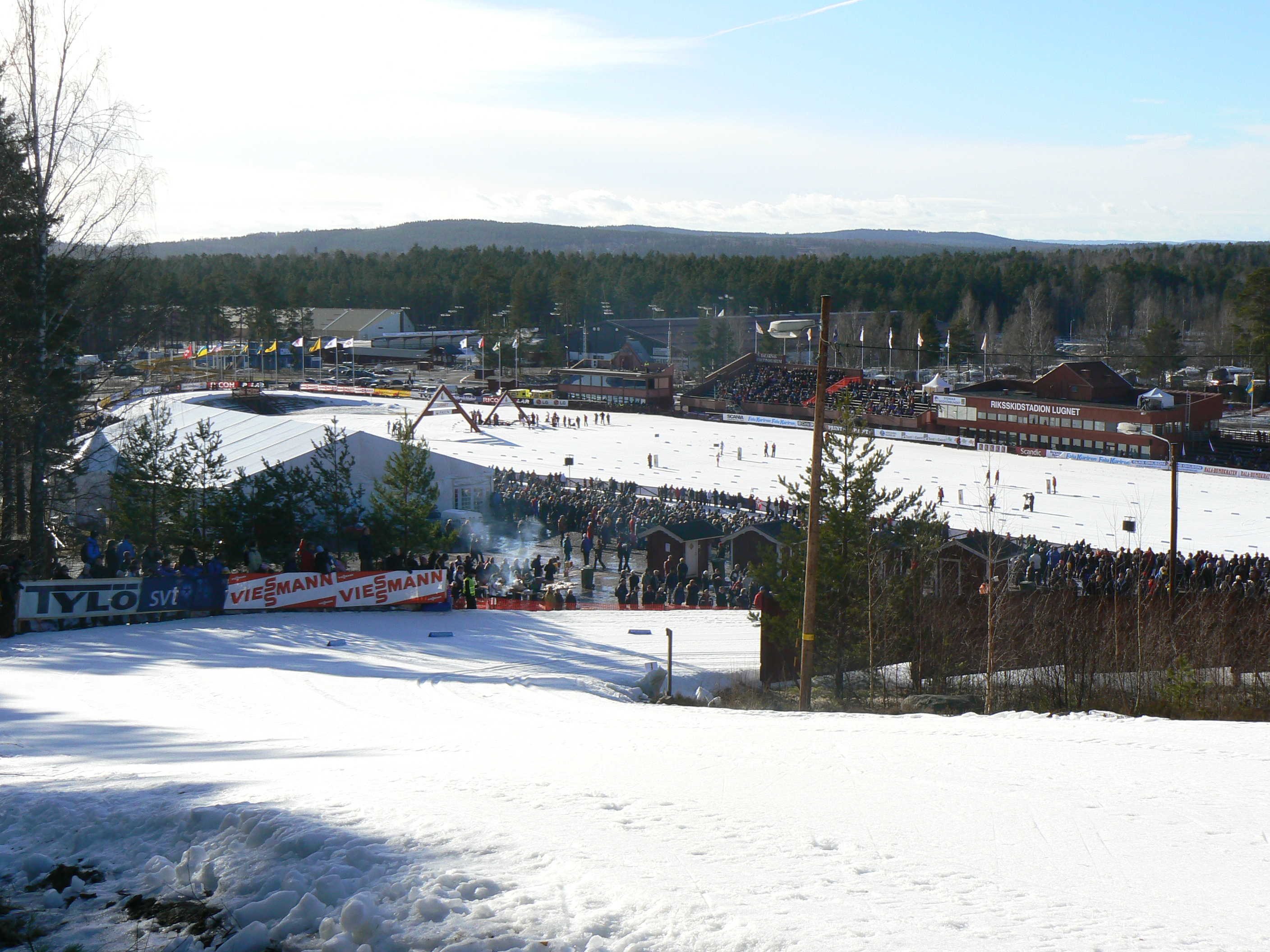 The Lugnet ski stadium in Falun, Sweden, at the Svenska skidspelen FIS World Cup event, February 24 2008.